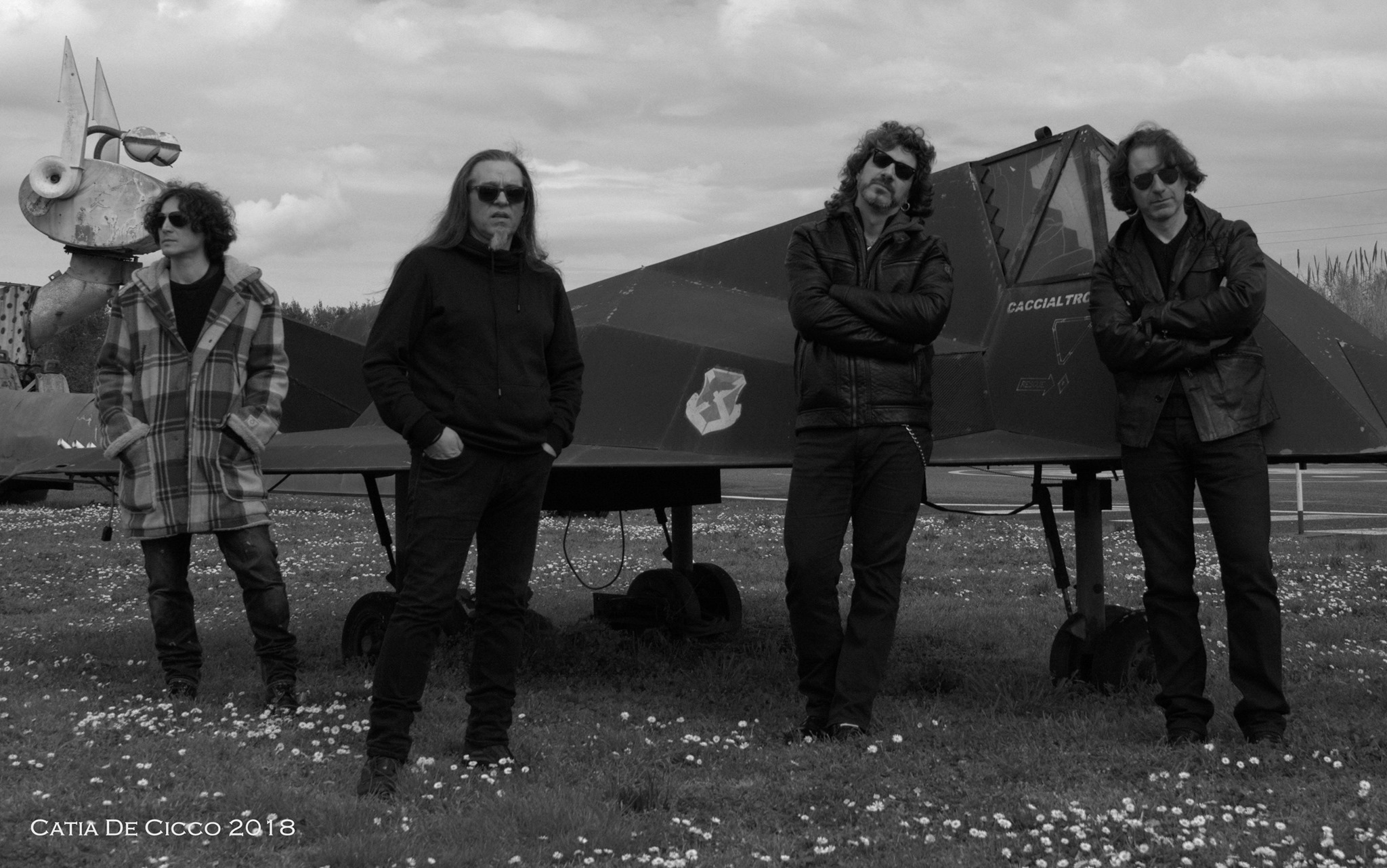 Offizielles Bandfoto